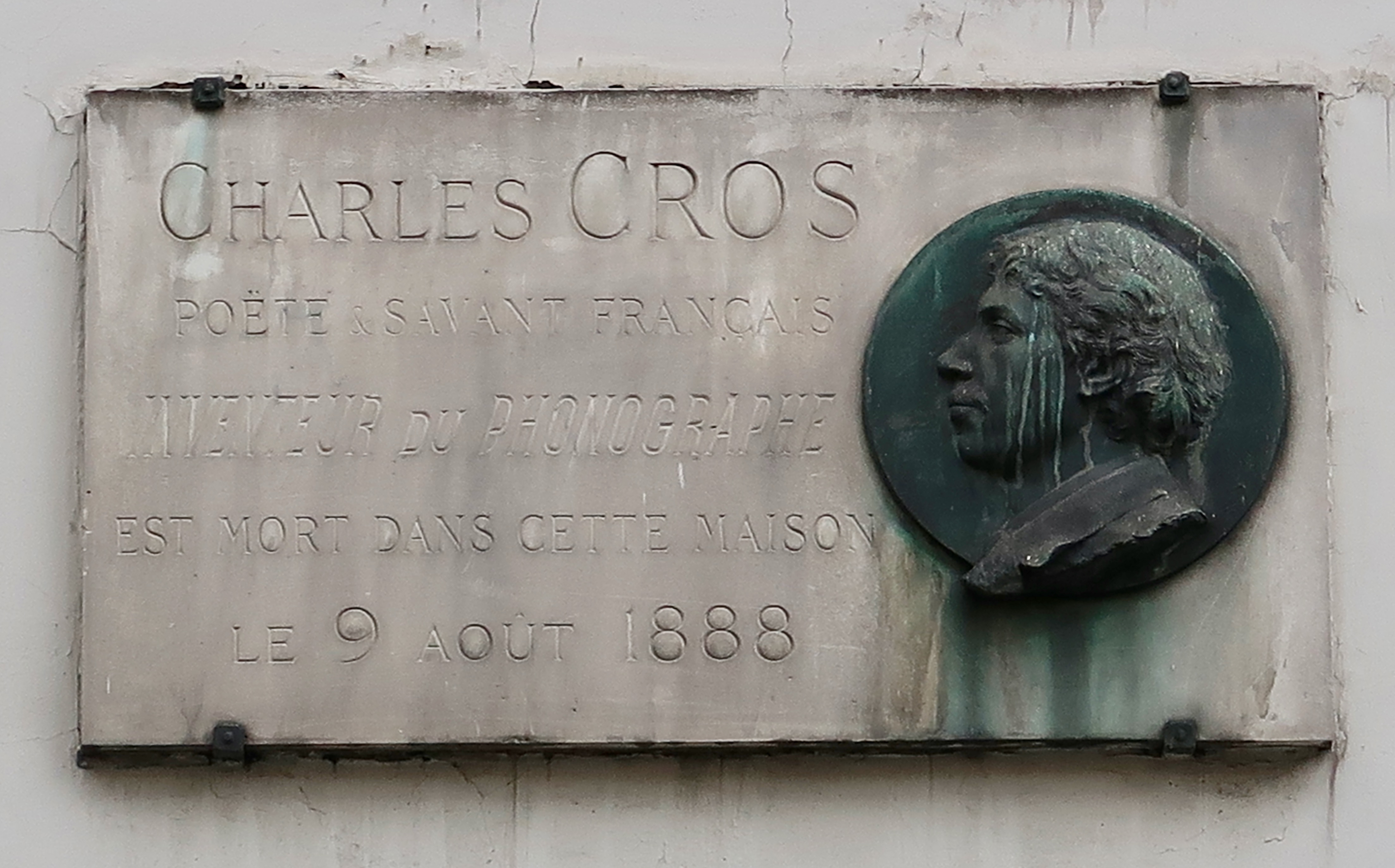 Plaque en hommage à Charles Cros, 5 rue de Tournon (Paris, 6e).